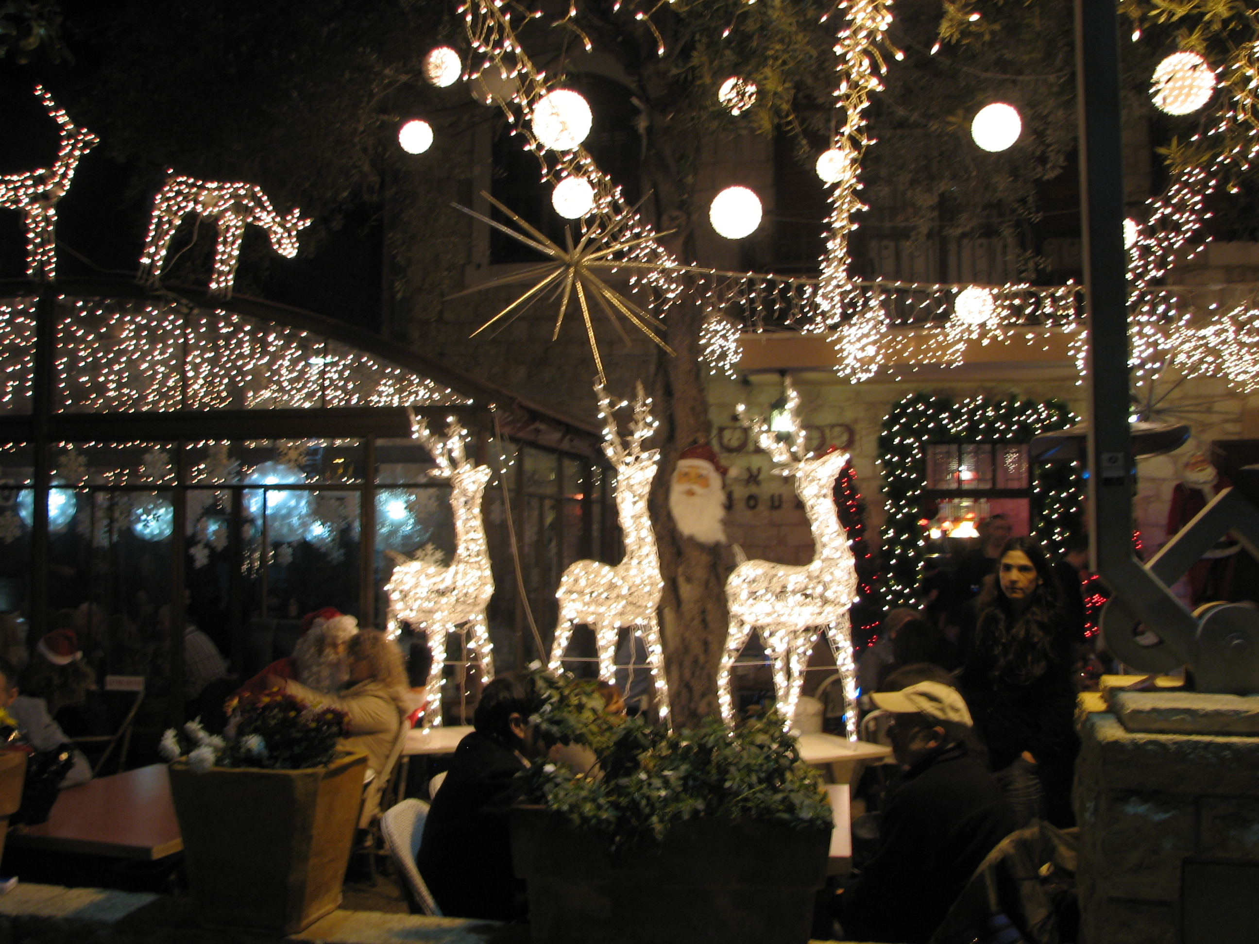 Holiday of Holidays festiva, Haifa Israel החג של החגים הוא פסטיבל הנערך בעיר חיפה מדי שנה, במהלך חודש דצמבר מראות בשדרות בן גוריון במושבה הגרמנית במסגרת הפסטיבל, חגיגות הכריסמס